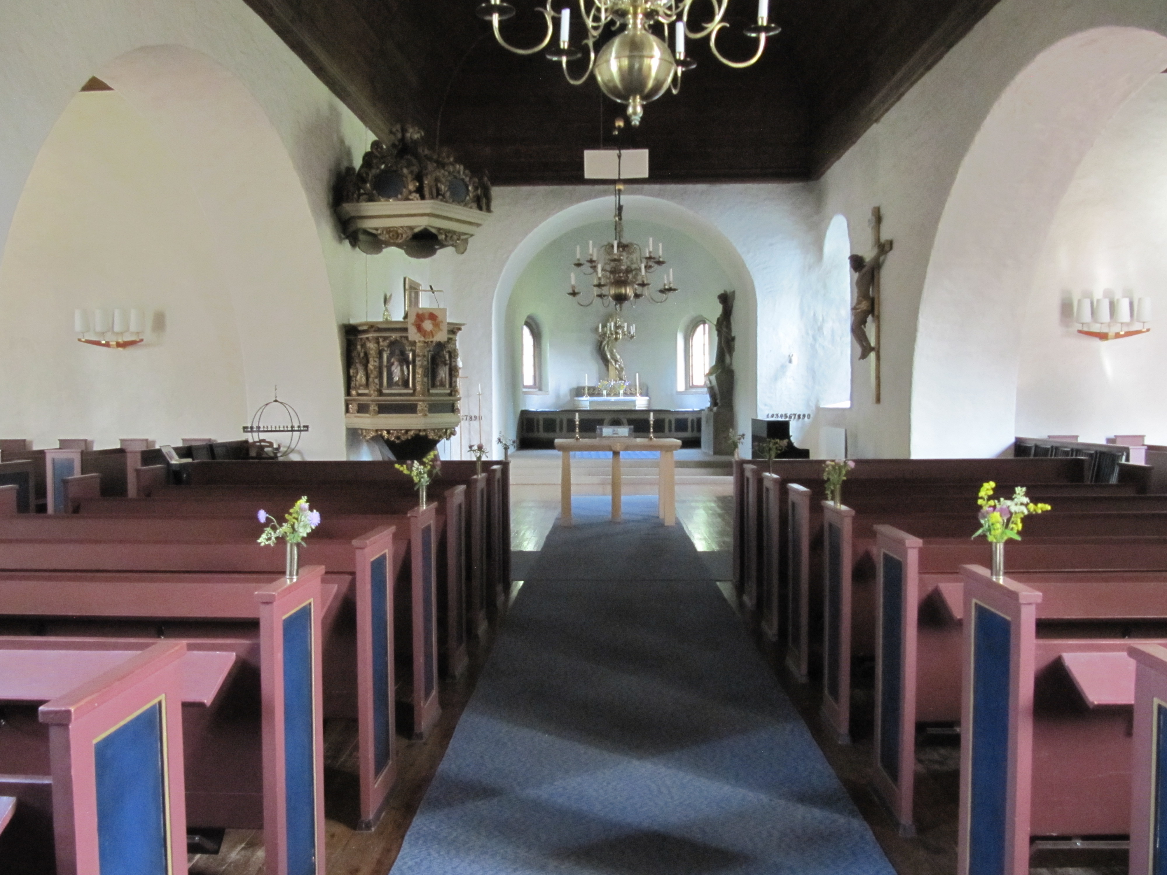 Kyrkorum i Byarums kyrka